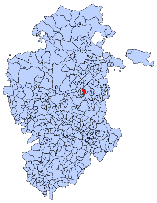 Cerratón de Juarros